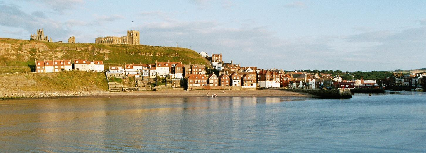 Whitbys østlige klipper og klosterruiner. Foto: AEK.